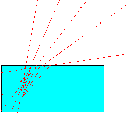 Non stigmatisme du dioptre plan, exemple de l'aquarium (Schéma personnel) Catégorie:schéma_de_physique